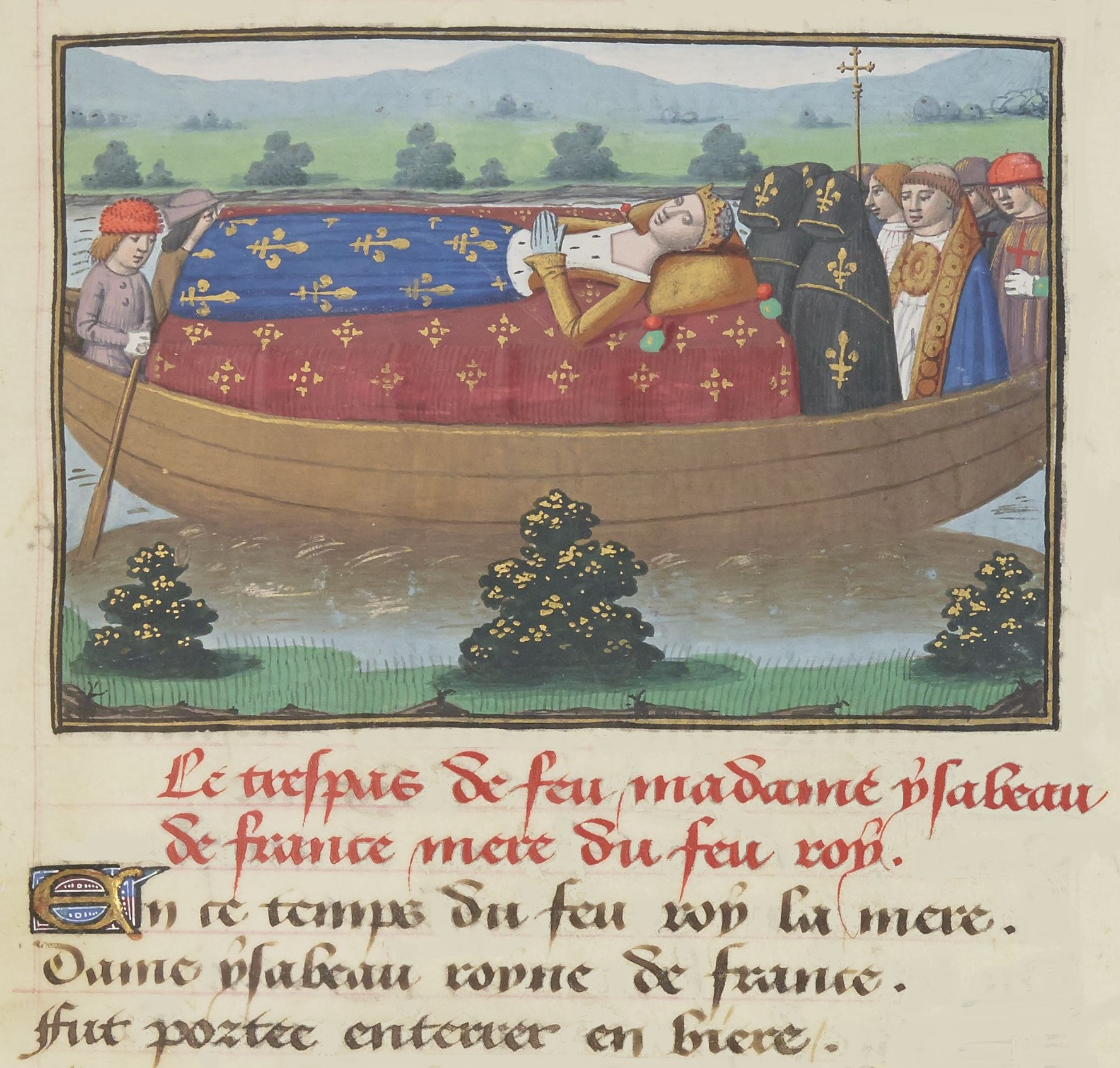 Funérailles de la reine Isabeau de Bavière.